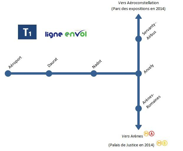 tracé de la future ligne envol selon les sources de tisséo